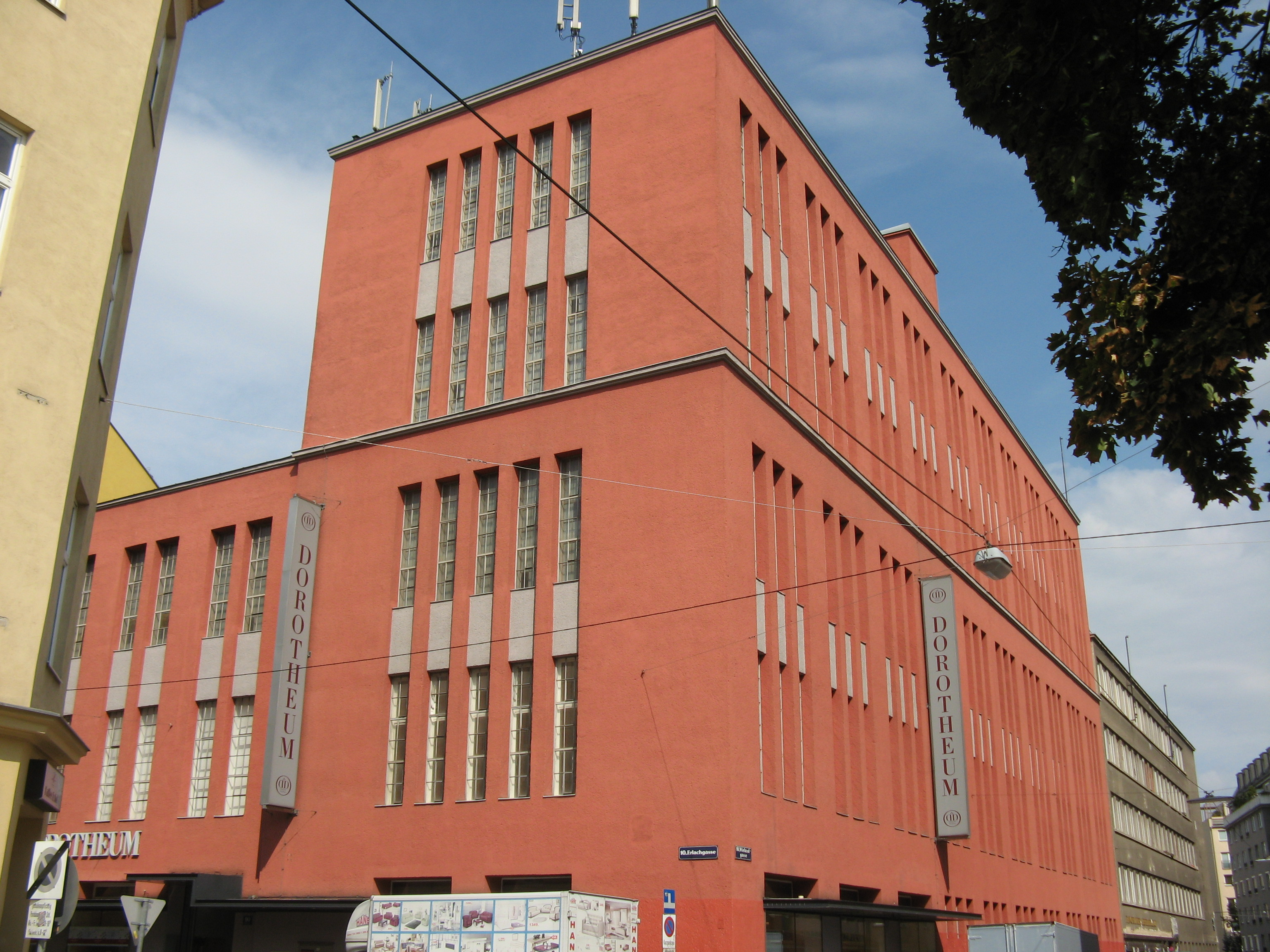 Dorotheum (1928/29) von Michael Rosenauer, Erlachgasse 90, Wien-Favoriten (More images, commons, de)